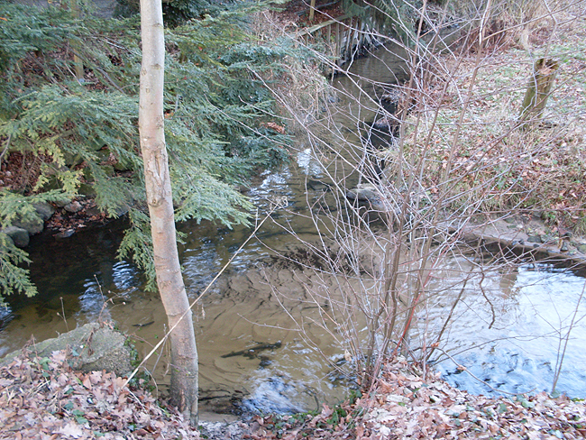 Einmündung des Tüterbaches (oben) in den Trüggelbach (rechts) in Bielefeld